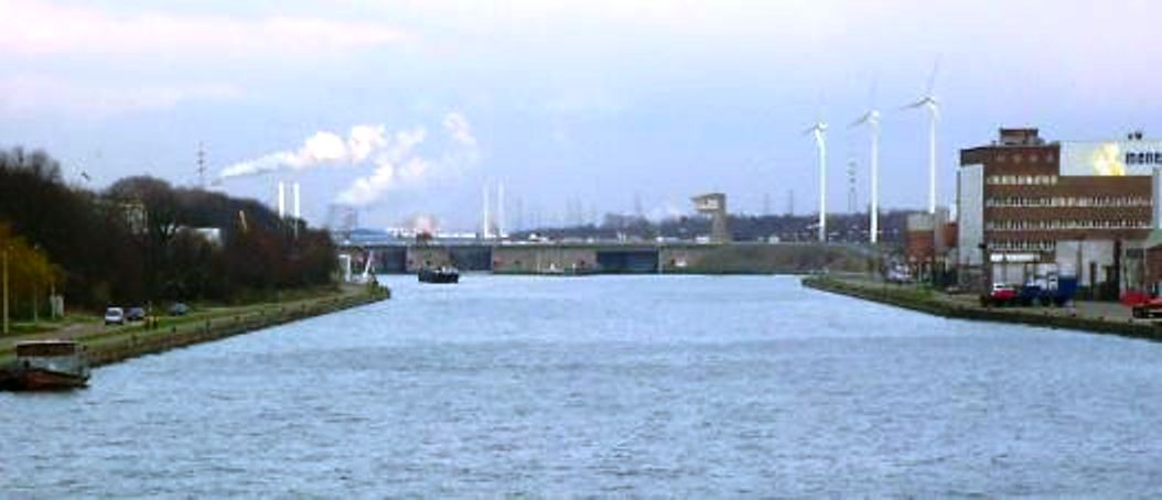 Albertkanaal bij Hasselt. De Sassluis op de grensstreek tussen Hasselt en Genk. richting horizon is richting Luik.